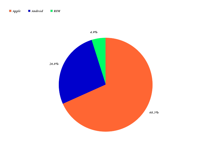 Diagram över marknadsandelar för surfplattor 2011-09